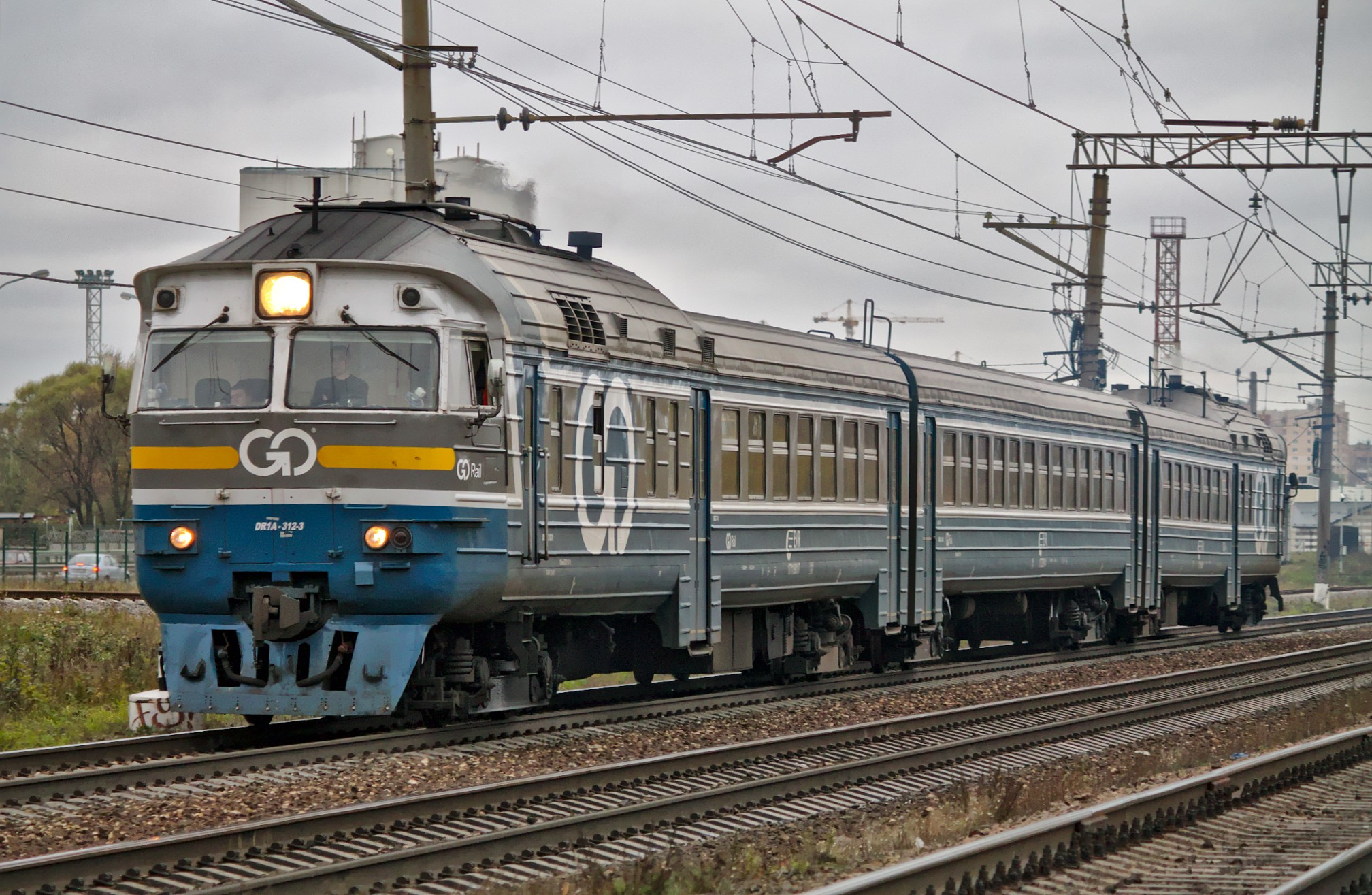 ДР1А-312, Санкт-Петербург - Таллин, Купчино - Шушары. см. фото 545782 в альбоме автора